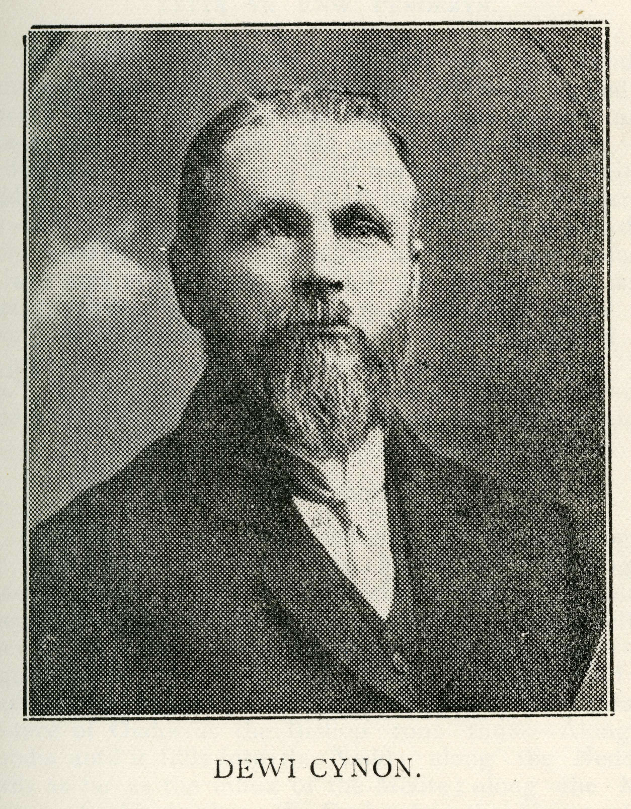 Llun o Arweinydd y Gân ac hanesydd lleol o Blwyf Penderyn. (O'r gyfrol "Hanes Plwyf Penderyn" a gyhoeddwyd yn 1924 gan Pugh & Rowlands, Aberdar.